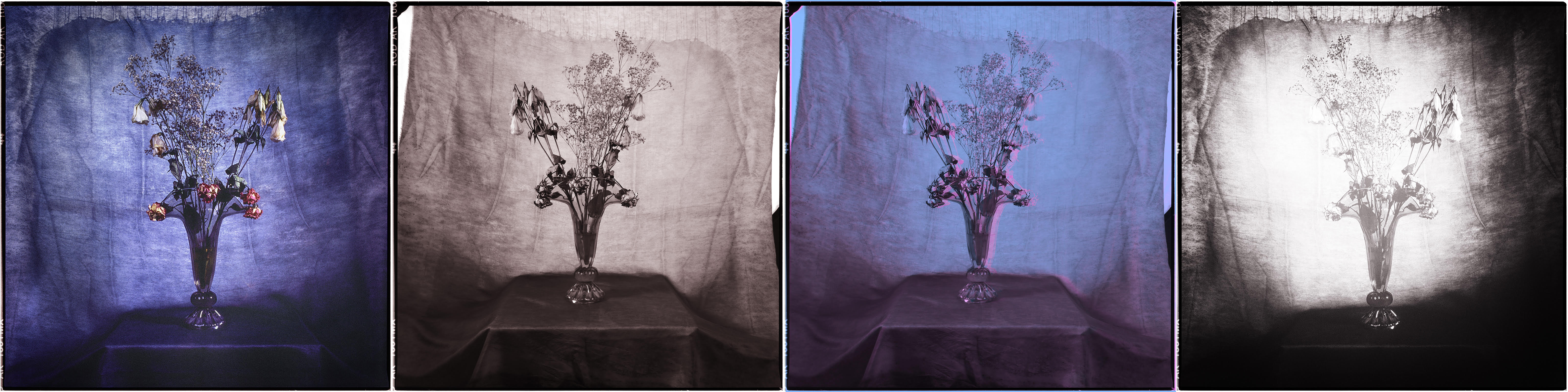 Hommage_a_KG_23by Péter Tímár